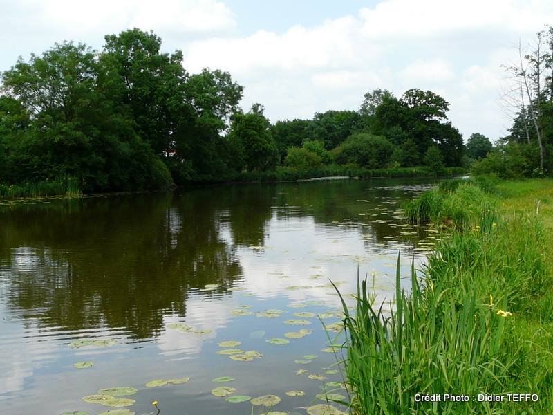 La rivière du Don à Beaujouet (Nozay) (44170)